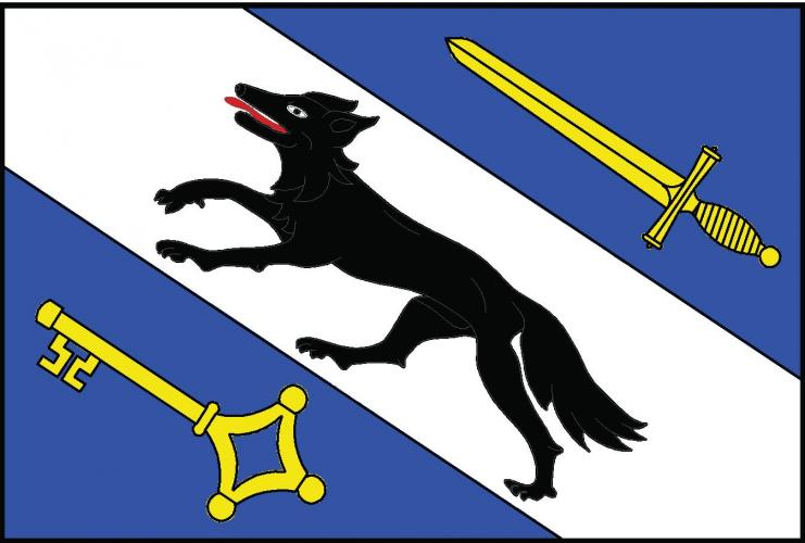 vlajka,Konecchlumí , okres Jičín